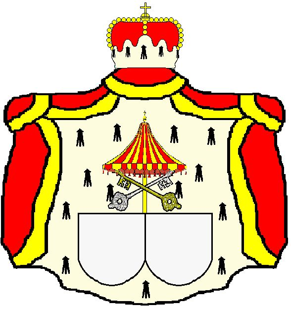 Eigen tekening. Een wapen zoals de Prinsen Boncampagni Ludovesi dat voeren. Men kan heraldisch-technisch bezwaar maken tegen de grote van het schild maar de tekenaar heeft getracht om de twee schilden in dit alliantiewapen en de pauselijke ombrellino met de sleutels van Sint-Petrus in een bepaalde verhouding te tekenen. Dit is dan het resultaat en ik ben niet van de Italiaanse praktijk afgeweken. Je moet nu eenmaaal niet alles beter willen weten. Robert Prummel 24 jan 2007 23:23 (CET)